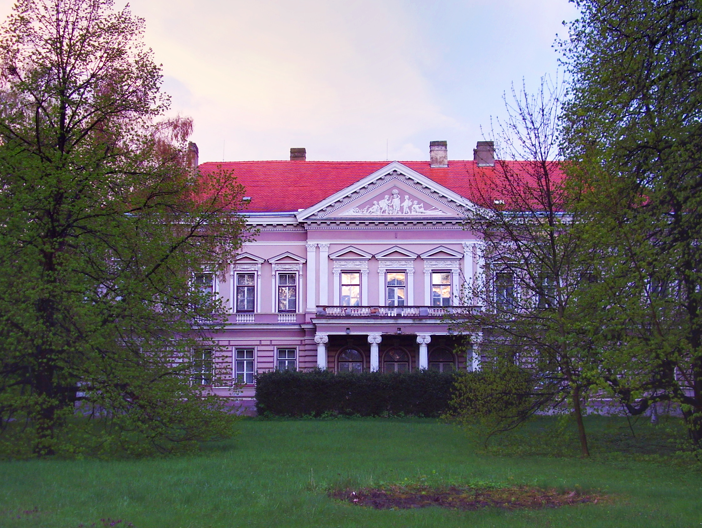 Kaštieľ v Novej Vsi nad Žitavou